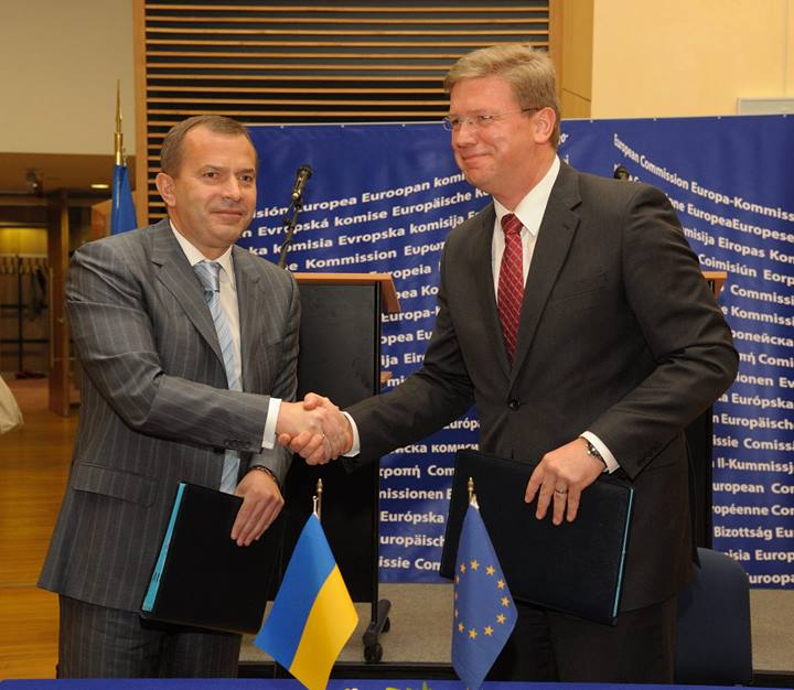 Андрей Клюев и Штефан Фюле